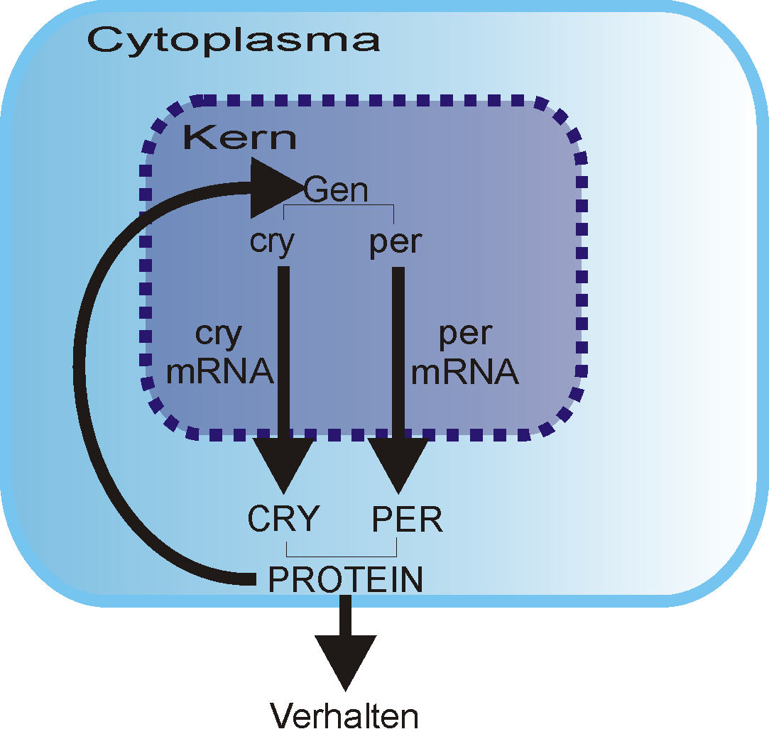 Cryptochrom-Kreislauf Grafik erstellt von Benutzer:Zoph und von ihm hochgeladen am 5. Januar 2006 als Bild:Cry.png, "verschoben" um Platz für ein Commons-Bild unter selbem Namen zu machen.